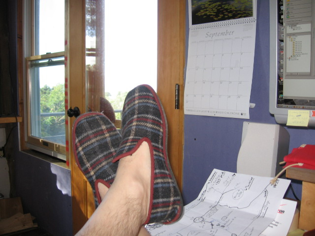 Charentaises